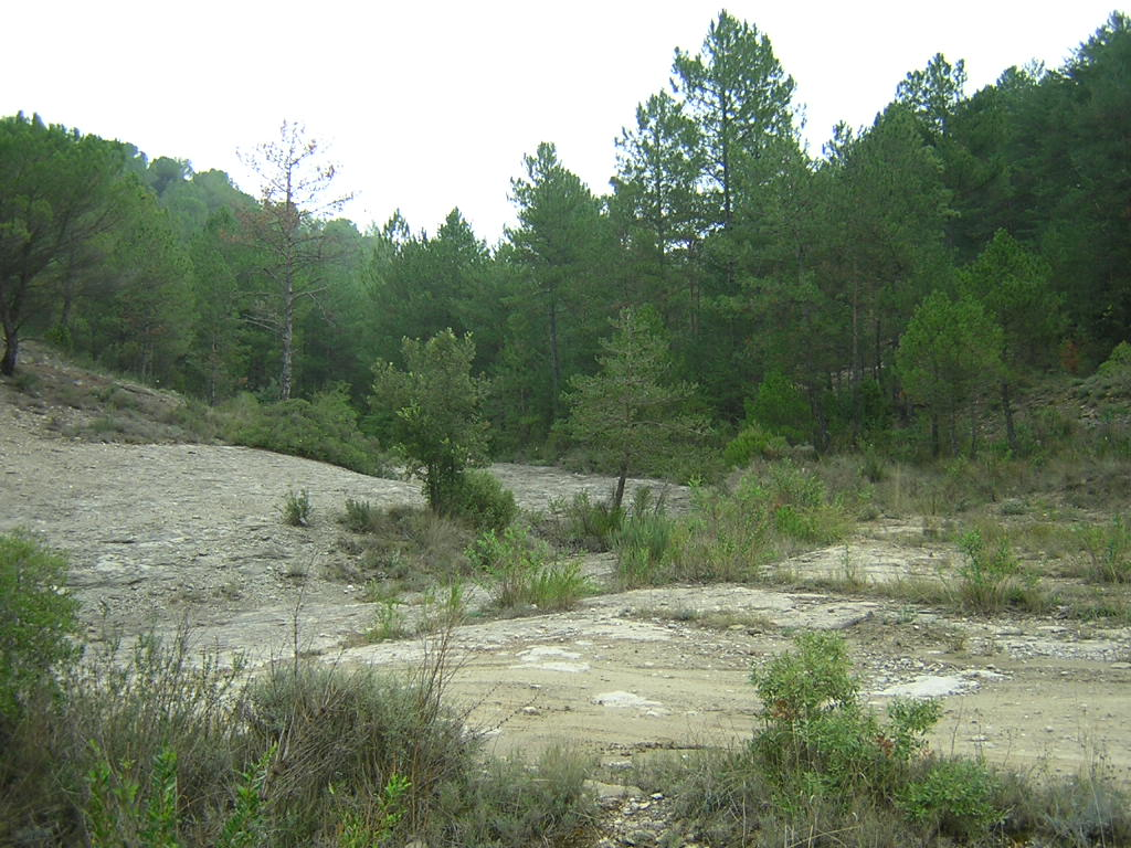 El torrent de la Fàbrega (Monistrol de Calders, Moianès)